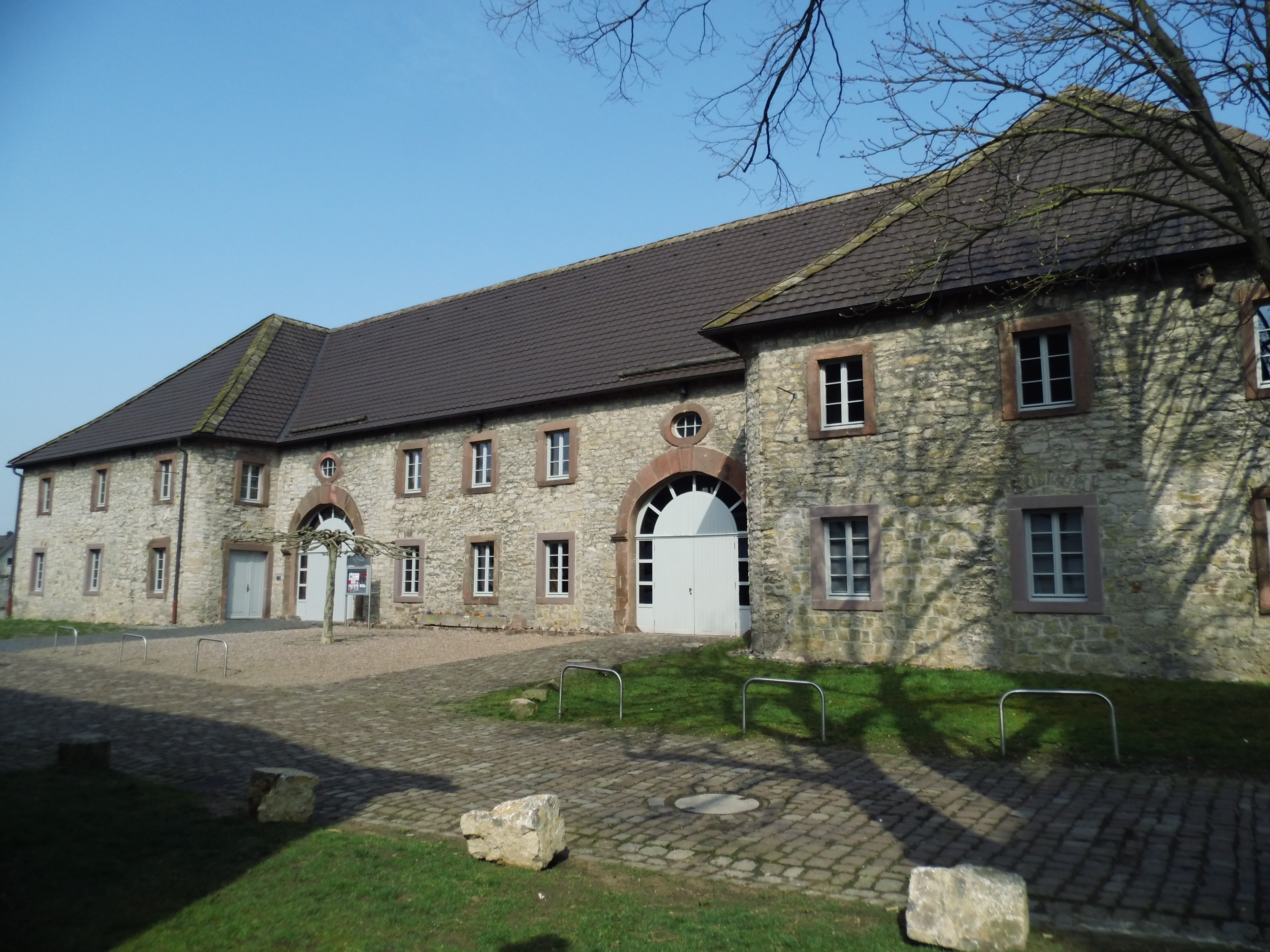 Baudenkmal, Liste der Baudenkmäler in Höxter Nr. 257